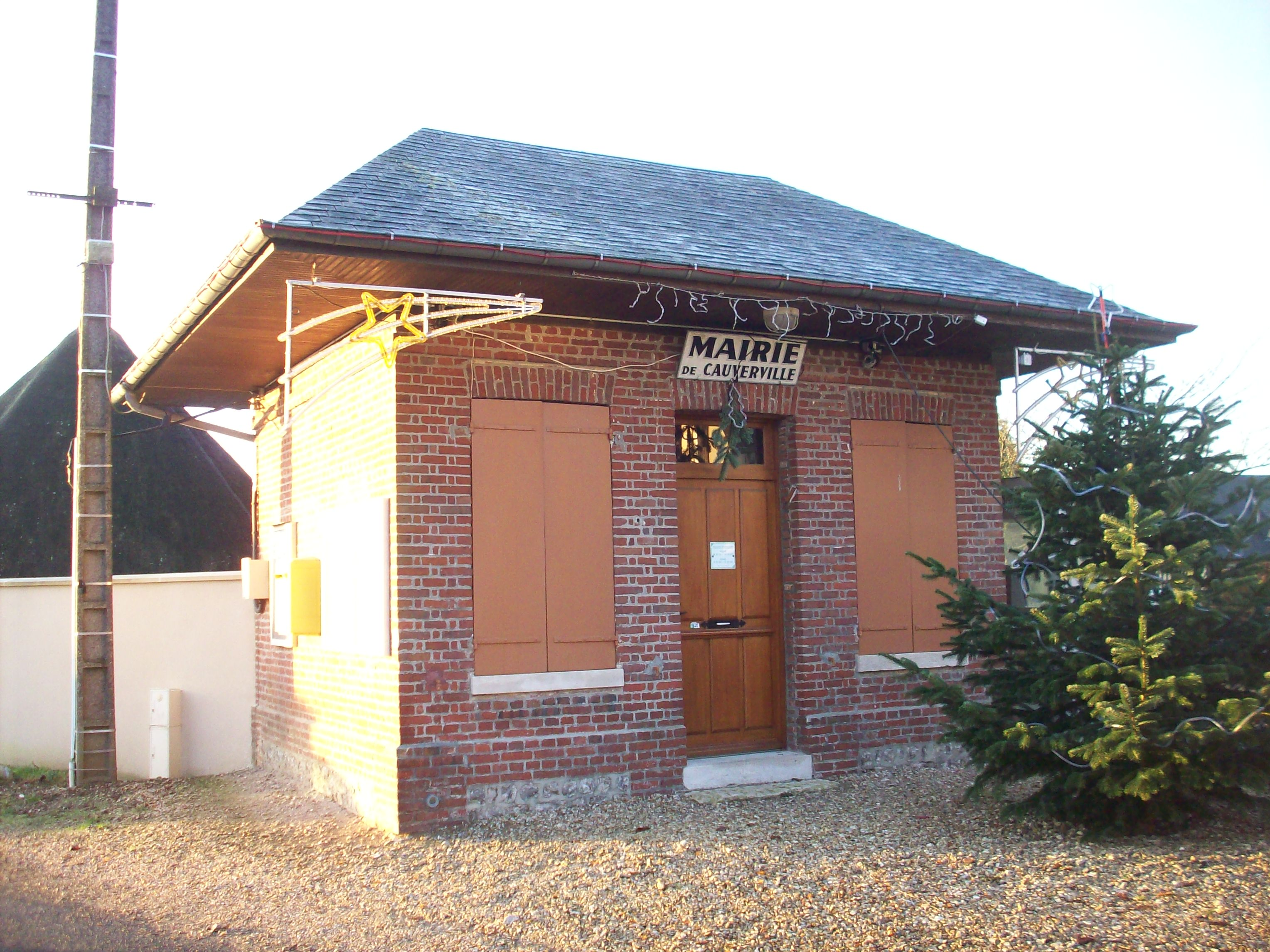 Mairie de Cauverville.